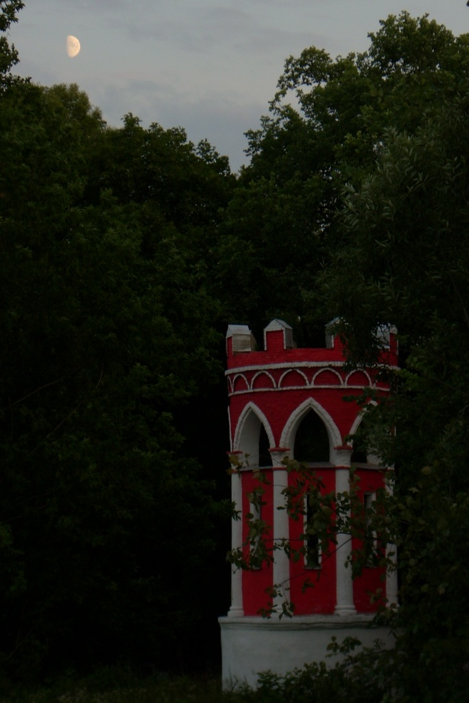 Башня Шамиля во Льгове.